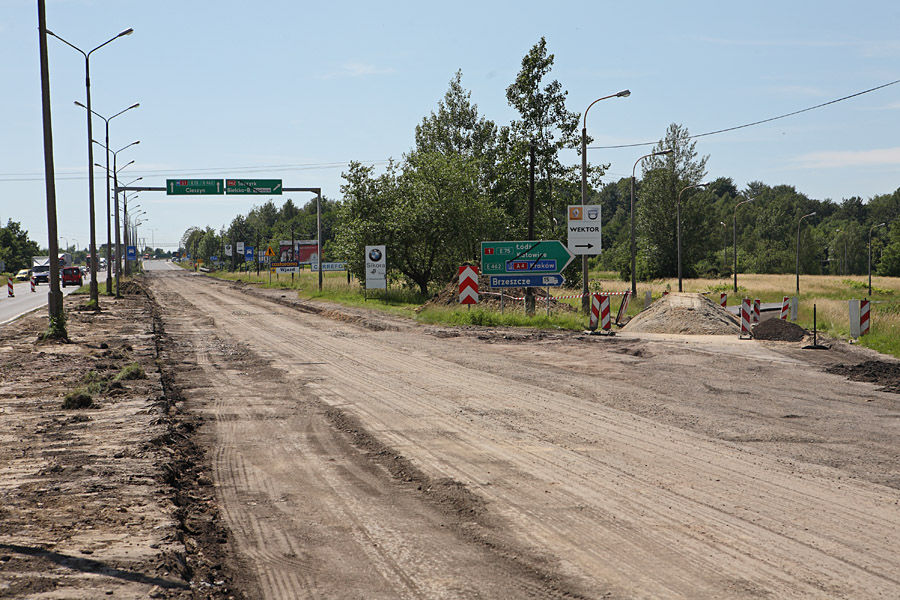 Budowa Północno-Wschodniej Obwodnicy Bielska-Białej.